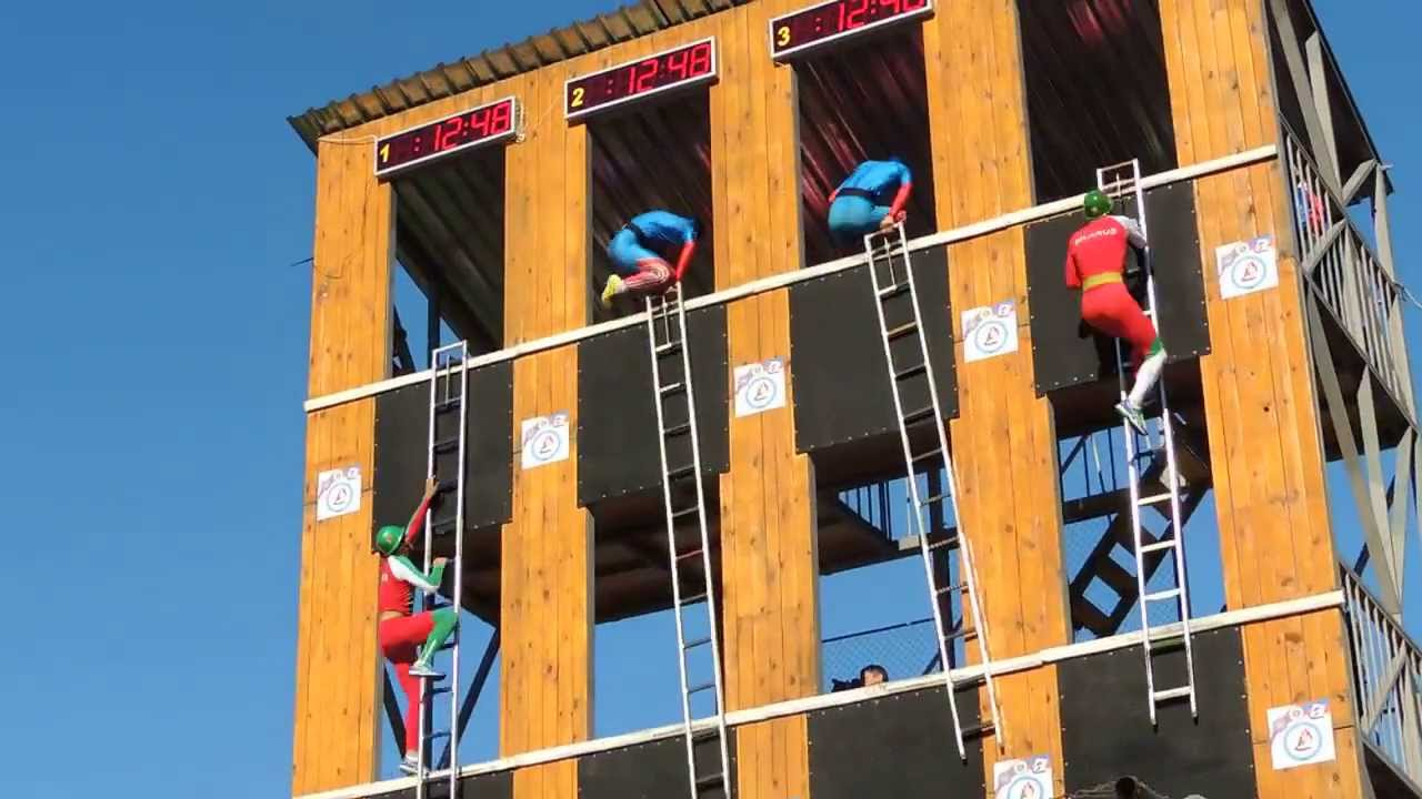 Участники финального забега Чемпионата Мира по пожарно-прикладному спорту финишируют в 4-й этаж учебной башни